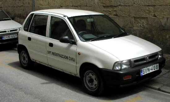 Maruti Zen hatchback